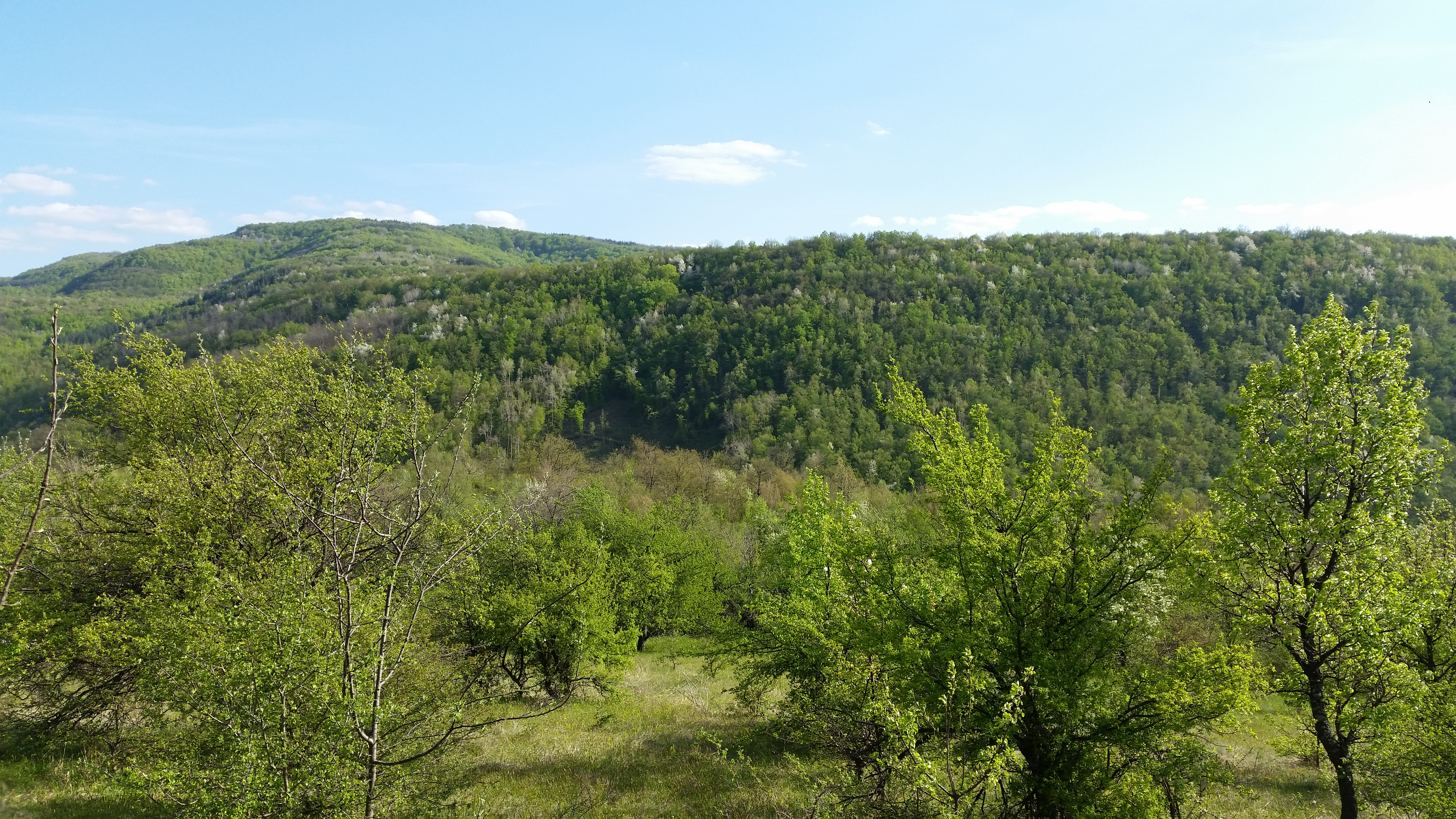 Усойната е горски масив в землището на село Шодековци.